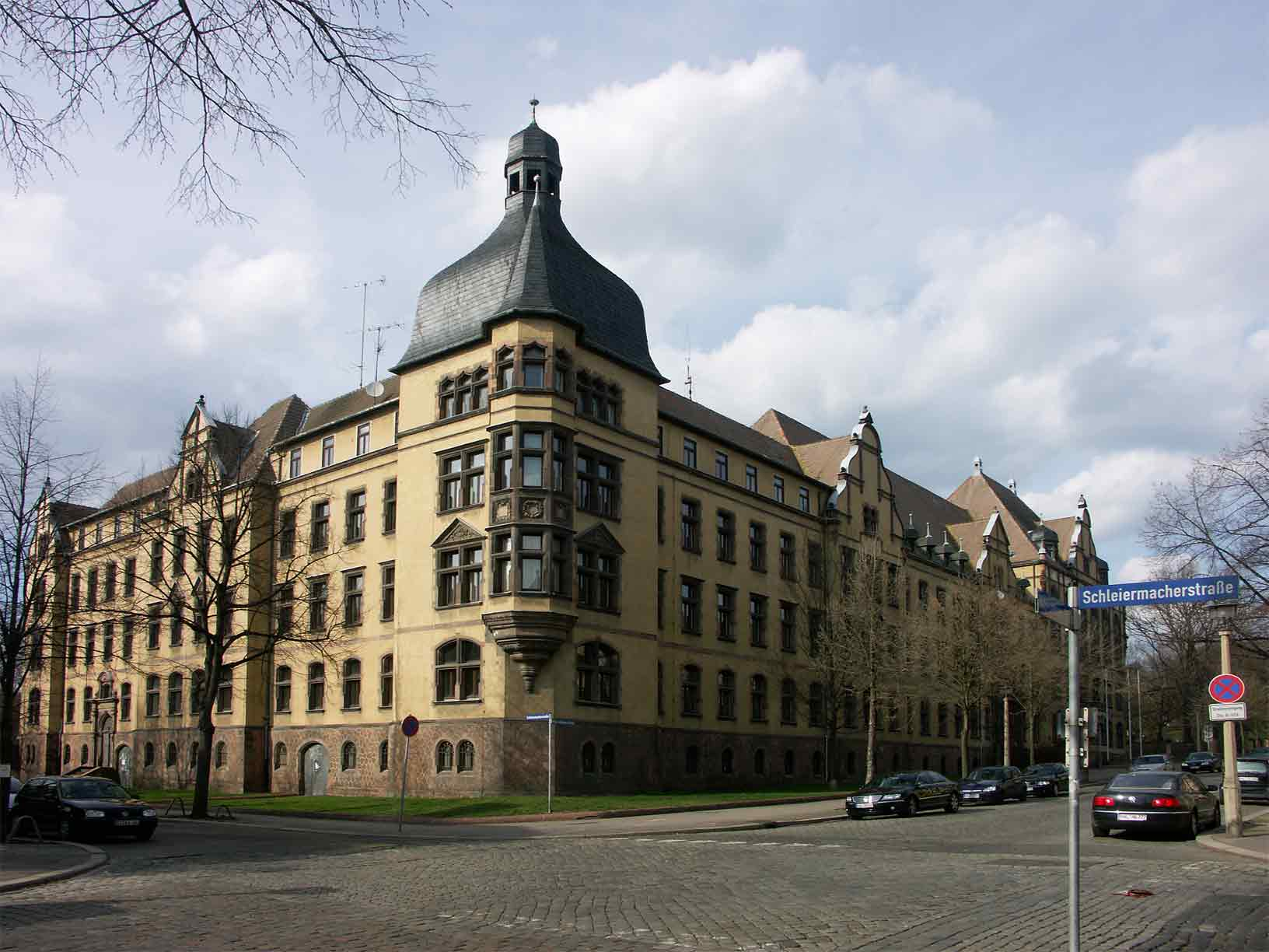 Gebäude des früheren Rat des Bezirkes Halle, erbaut 1907 als Landwirtschaftskammer der Preußischen Provinz Sachsen, ab 1990 Regierungspräsidium Halle, seit 2004 Landesverwaltungsamt (LVwA) Sachsen-Anhalt; Willy-Lohmann-Straße 7, Halle (Paulusviertel); seit 2017 zum "Wohnpark im Paulusviertel" gehörig, eigenes Foto 04-2006 Bettenburg